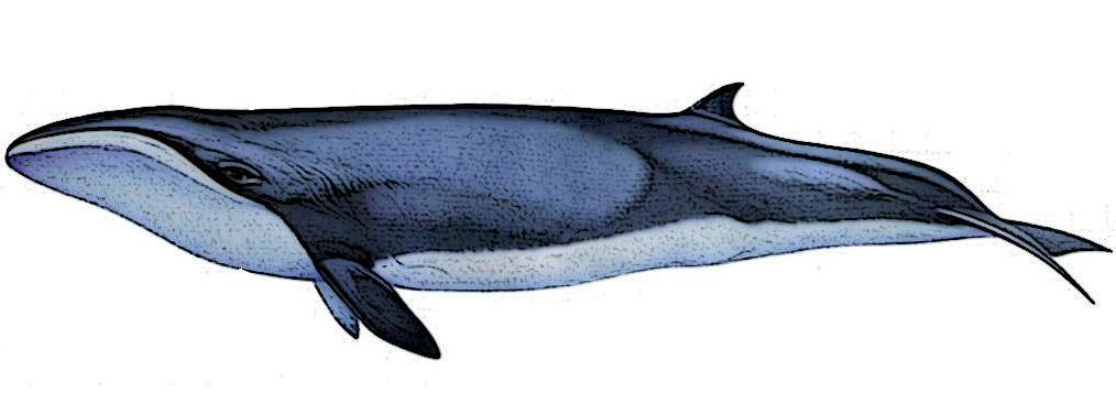 ballena franca pigmea o ballena franca enana (Caperea marginata)